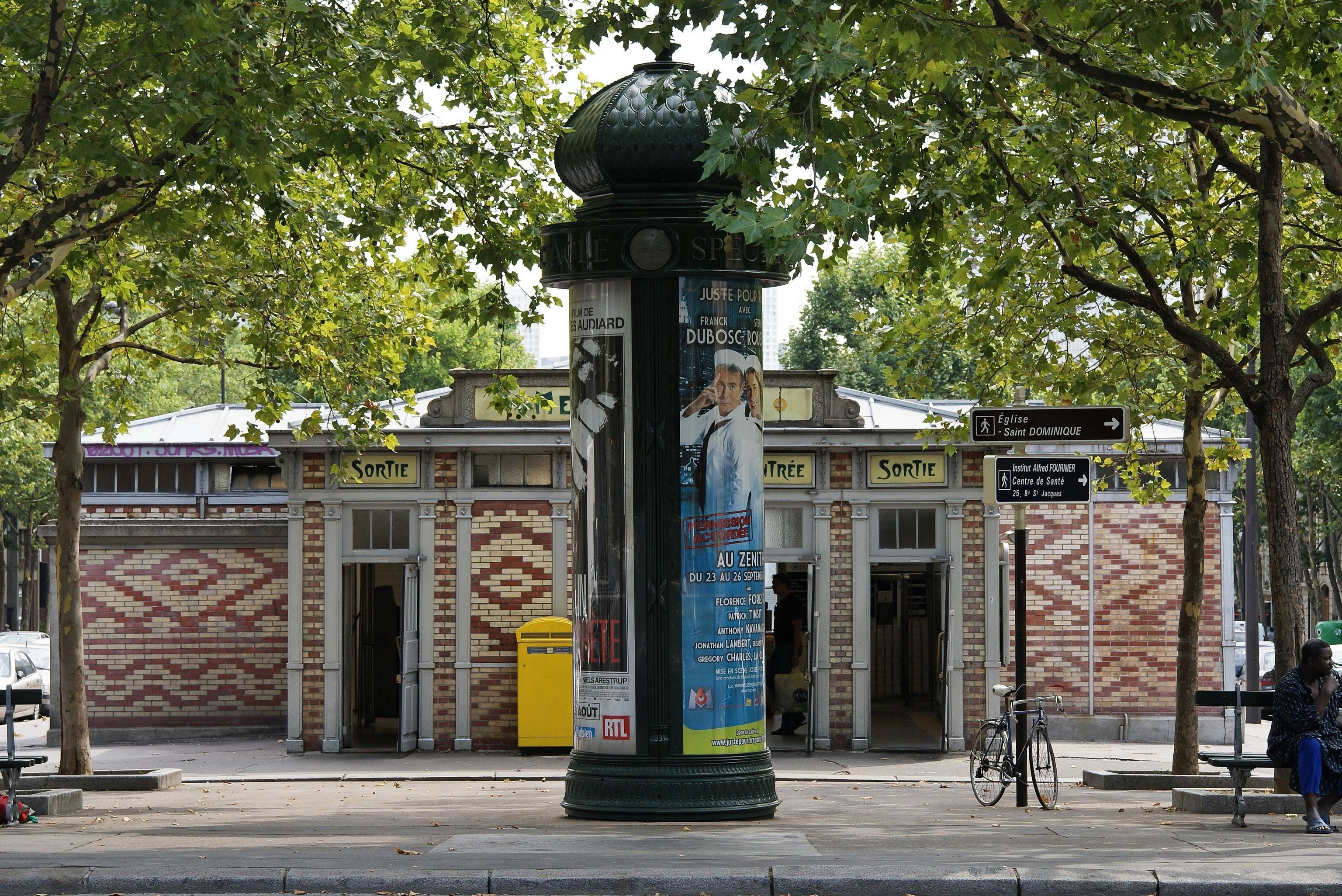 Entrée du Métro Saint Jacques à Paris